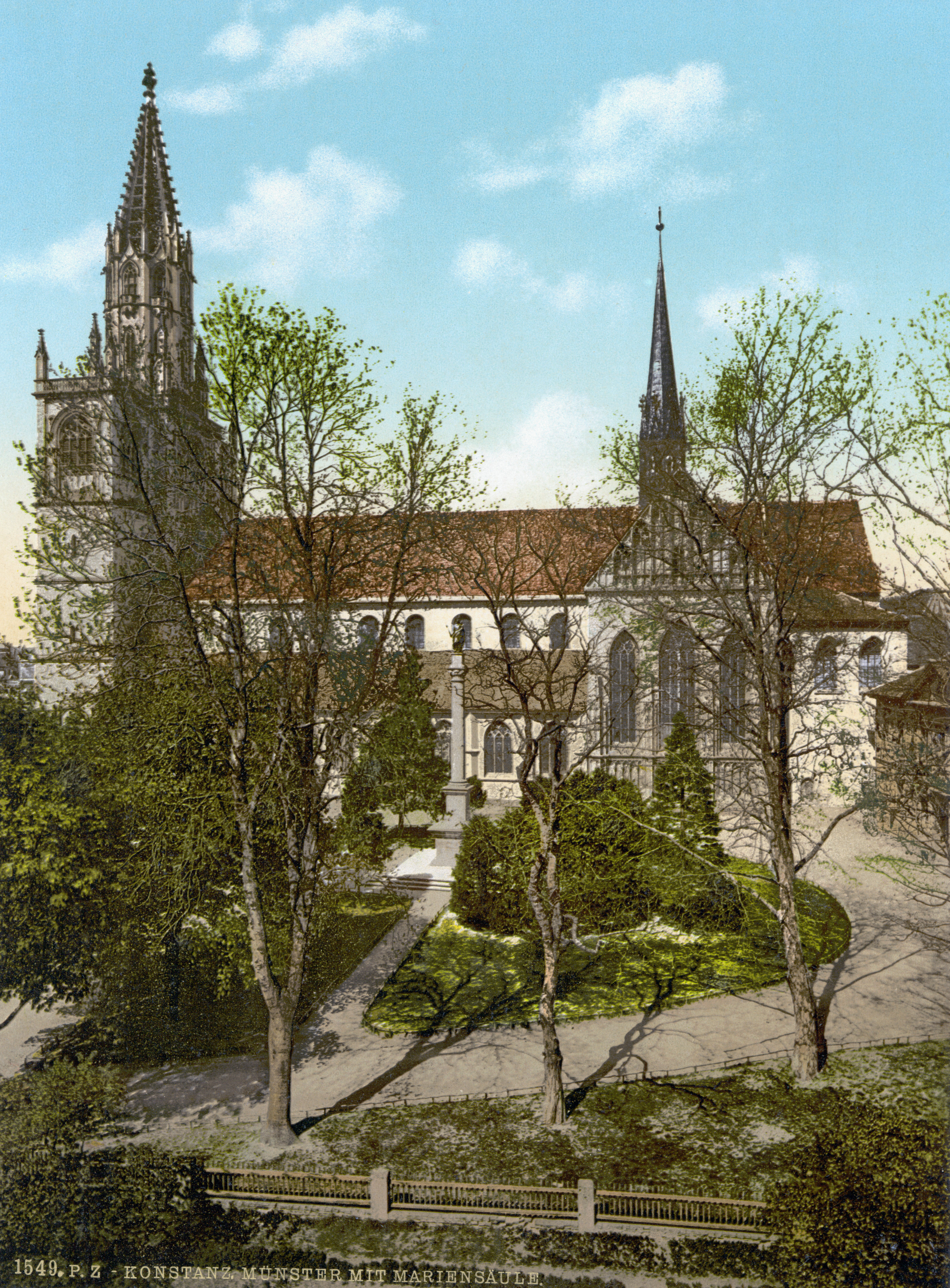 Konstanz Münster